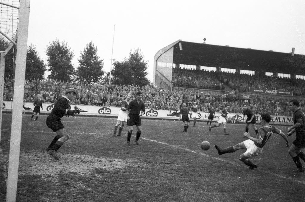 im Holsteinstadion. Im Bild u.a. Holsteins Hans-Peter Ehlers (3.v.l.).